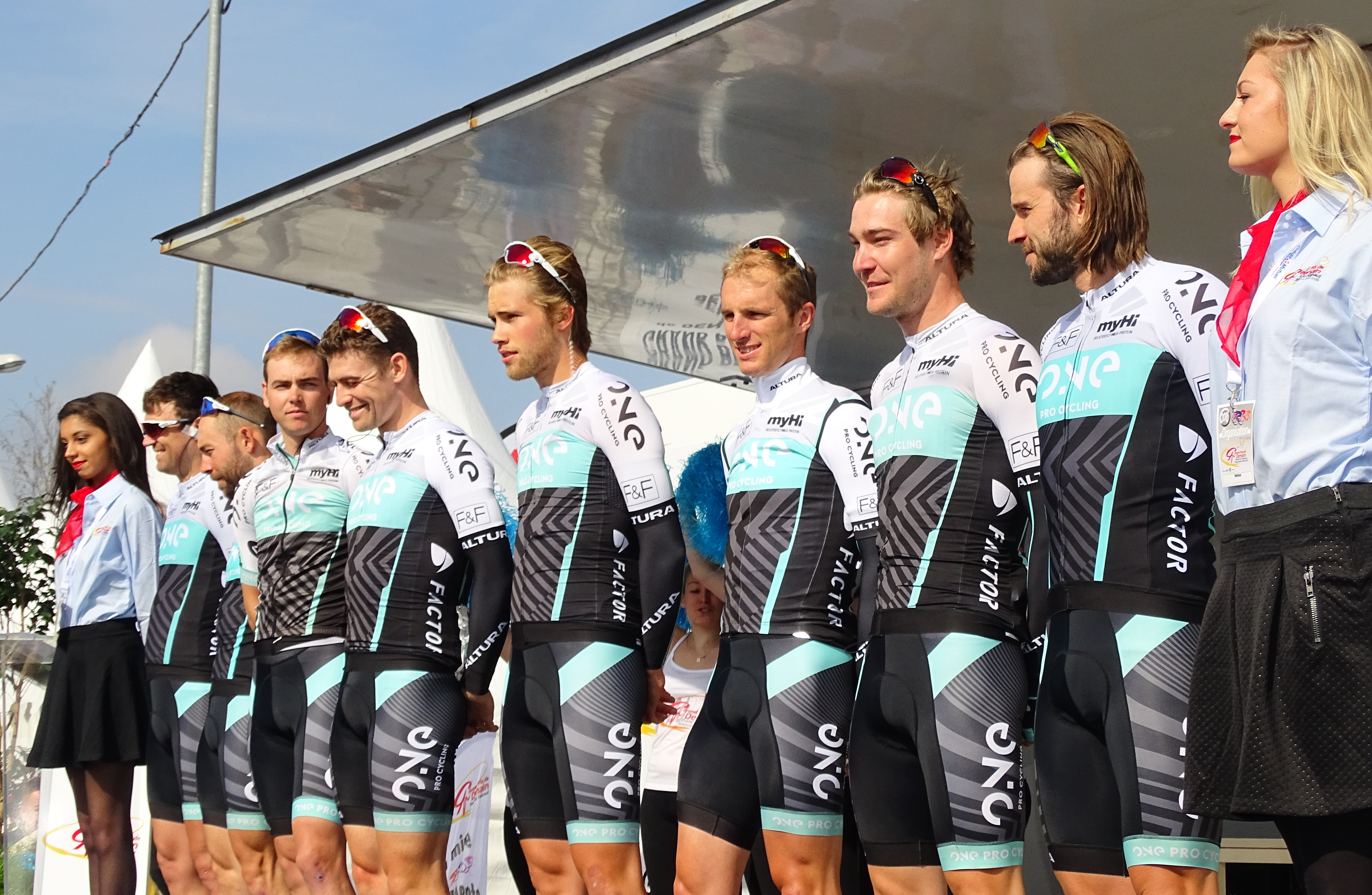 Reportage réalisé le jeudi 14 avril à l'occasion du départ et de l'arrivée du Grand Prix de Denain 2016 à Denain, Nord, Nord-Pas-de-Calais-Picardie, France.